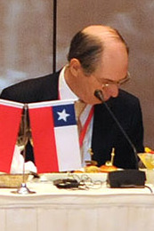 El Presidente de la República, Sebastián Piñera, participó en un desayuno de trabajo con altos ejecutivos de empresas chinas.